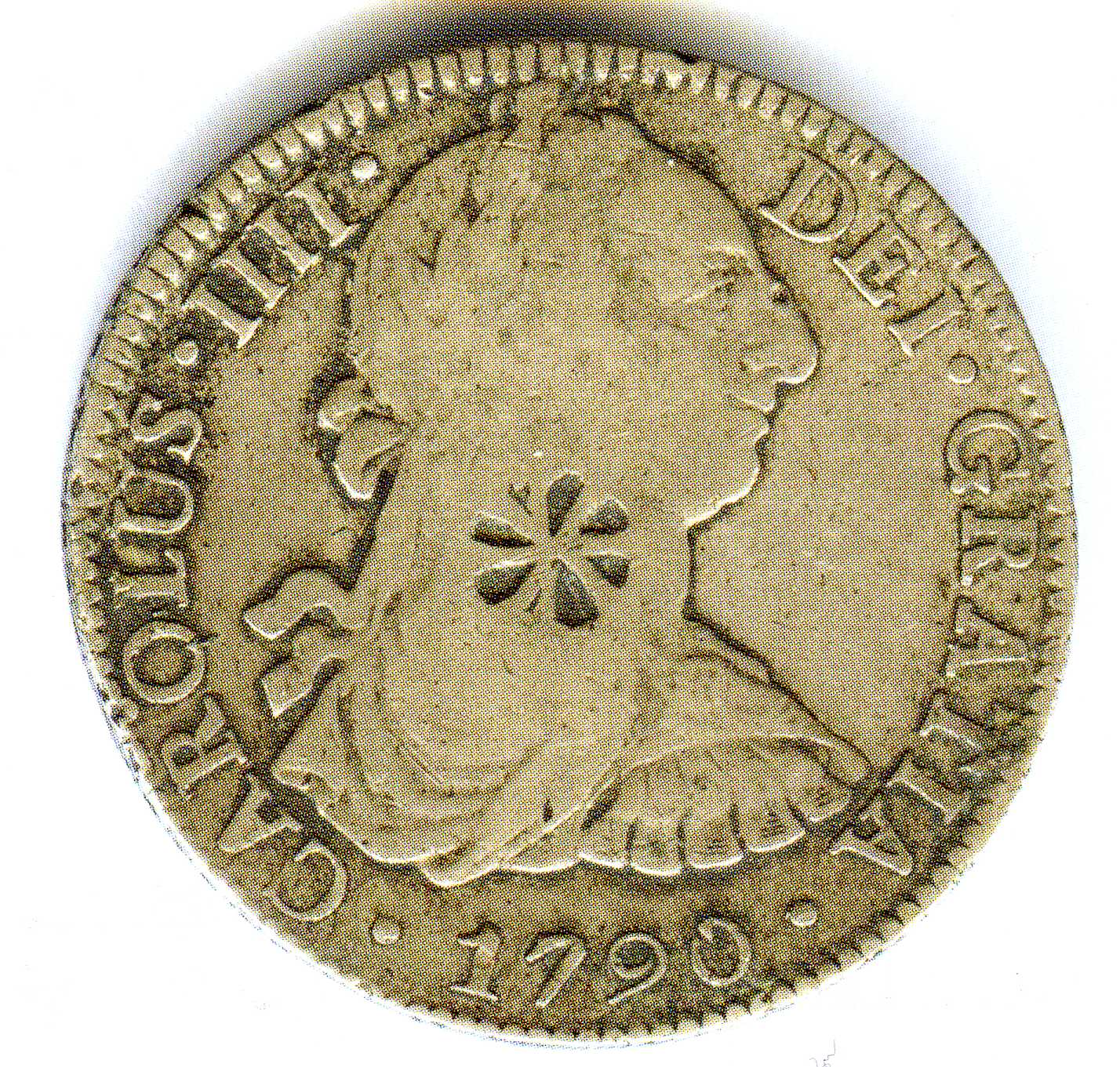 Moneda con contramarca empleada en en Soumanap